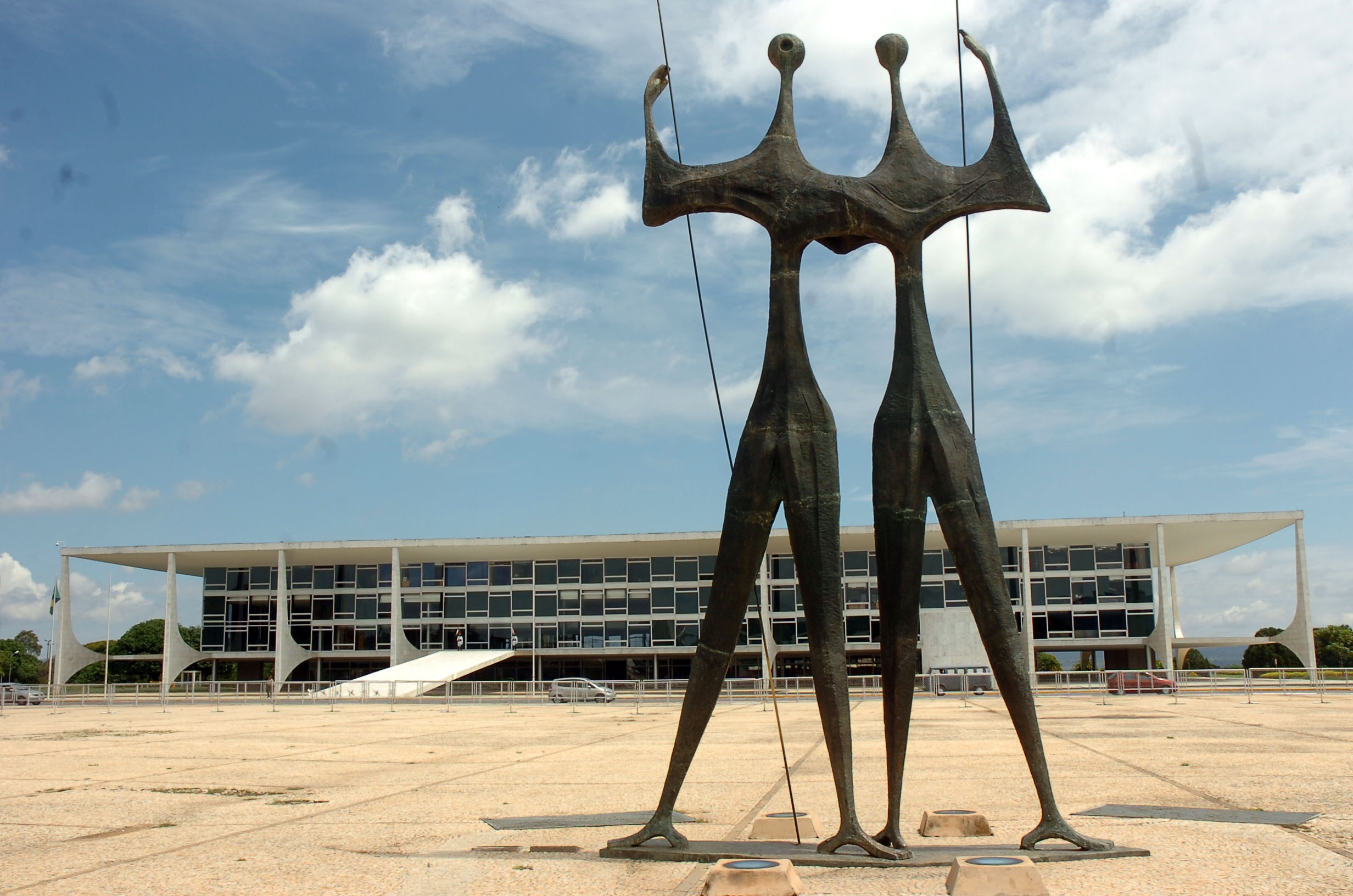 Imagem de Brasília